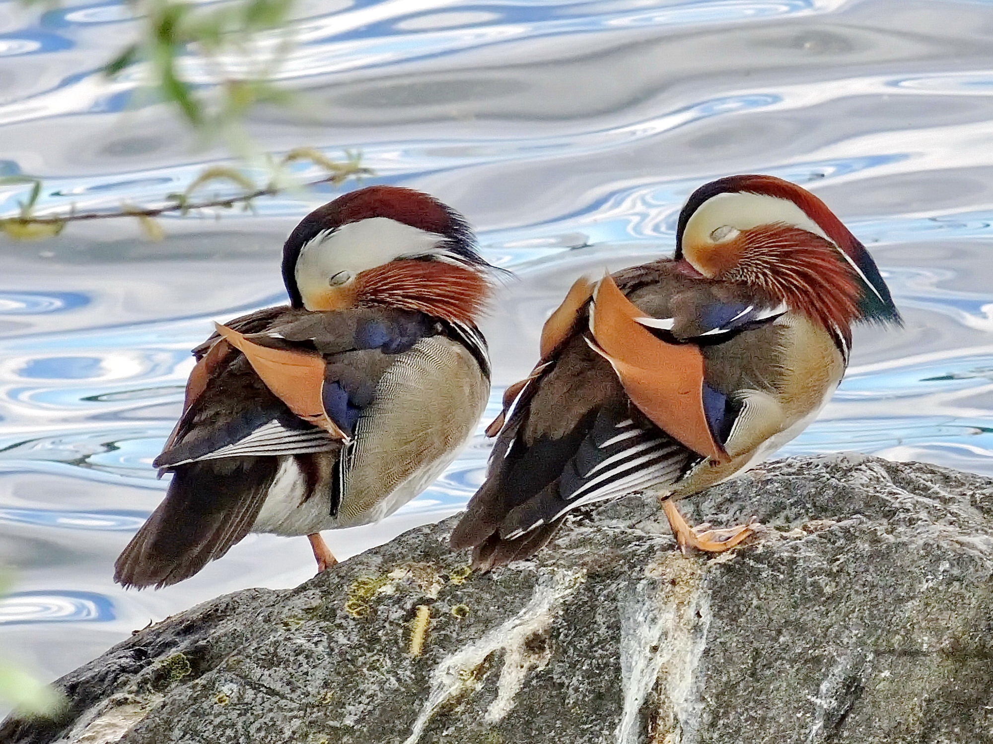 Aix galericulata, Seefeldquai in Zürich (Switzerland)